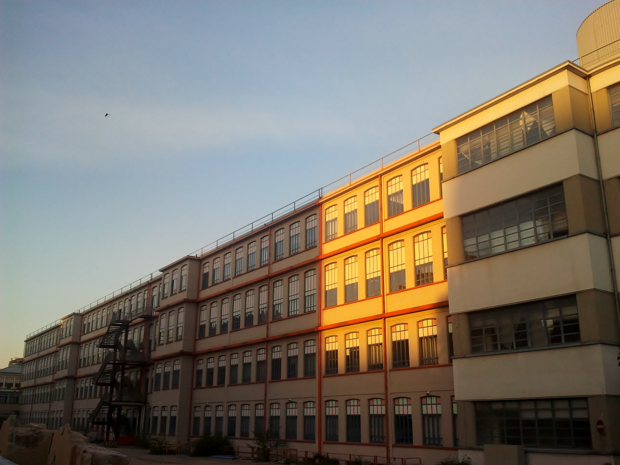 ex Lancia Borgo San Paolo. Torino. Italy